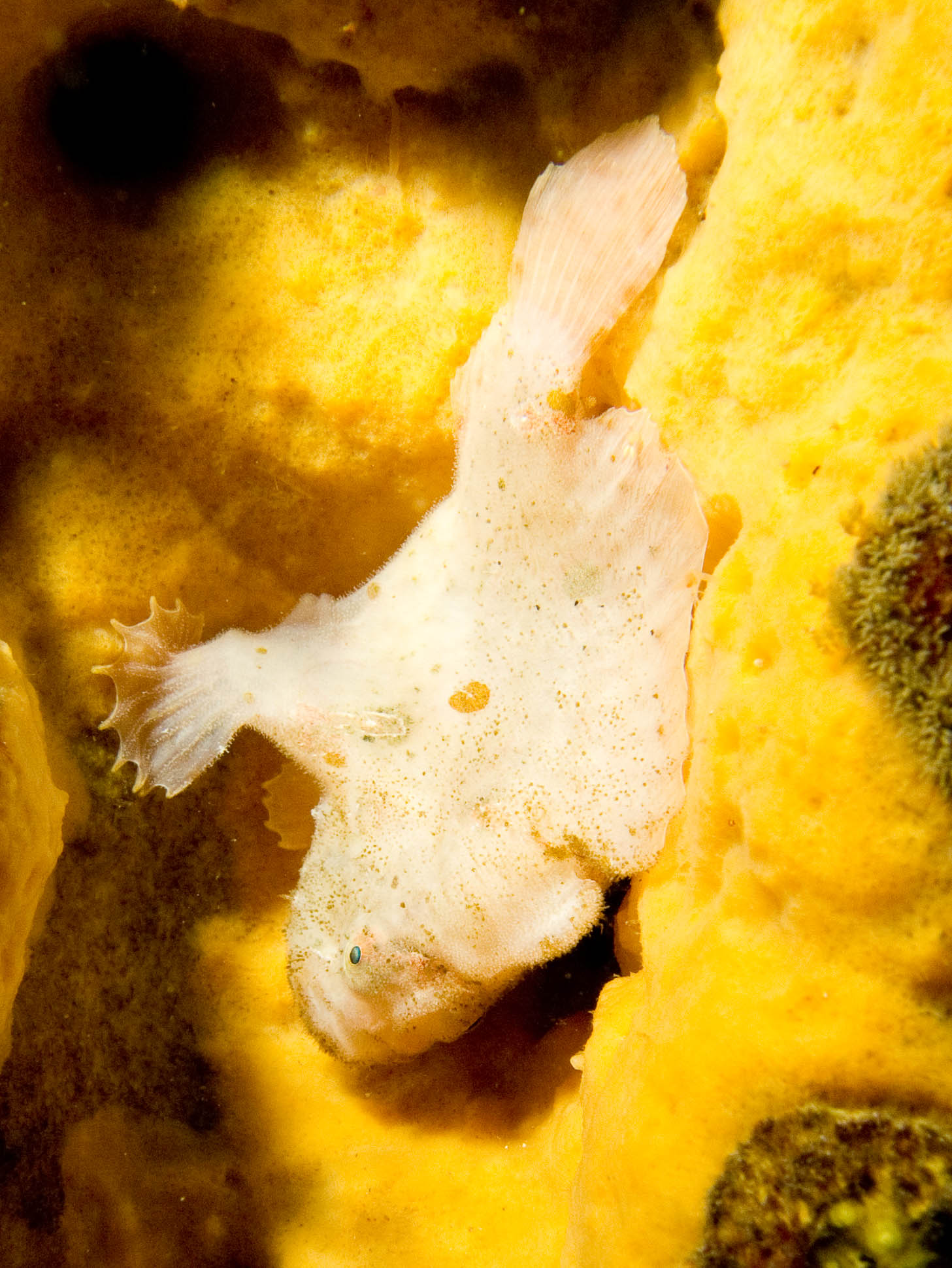 Frog fish